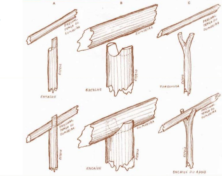 Amarração e encaixe 1 indigena